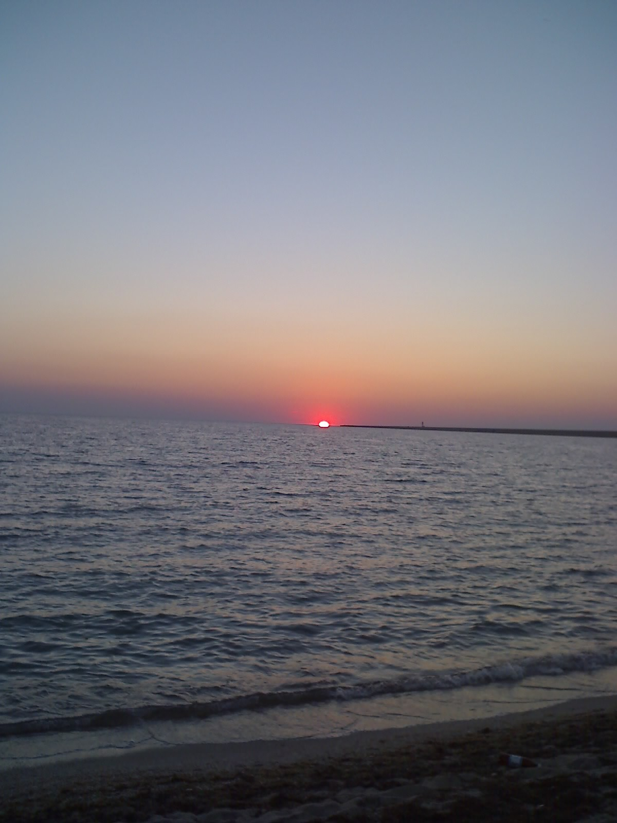 Закат в Межводном